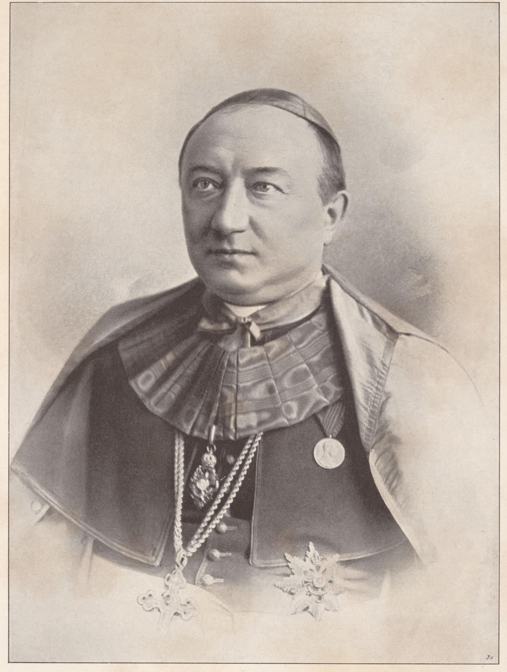 Bischof Coloman Belopotoczky, Apostolischer Feldvikar, Wien